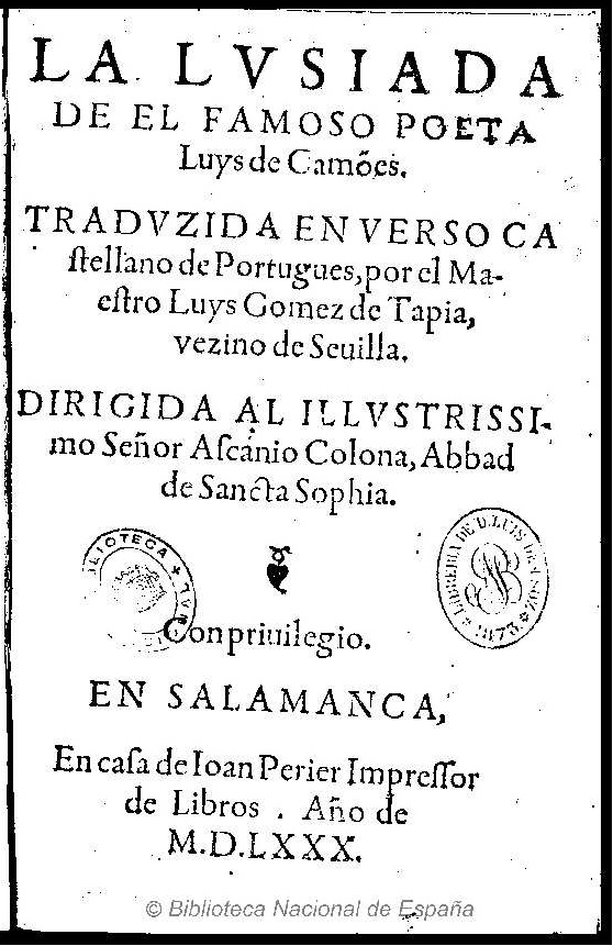 Os Lusíadas Título: La Lusiada de el famoso poeta Luys de Camões, traduzida en verso castellano de portugues por ... Luys Gomez Tapia ... Autor: Camões, Luís de (1524?-1580) ; Gómez de Tapia, Luis Fecha: 1580 Datos de edición: En Salamanca en casa de Ioan Perier .